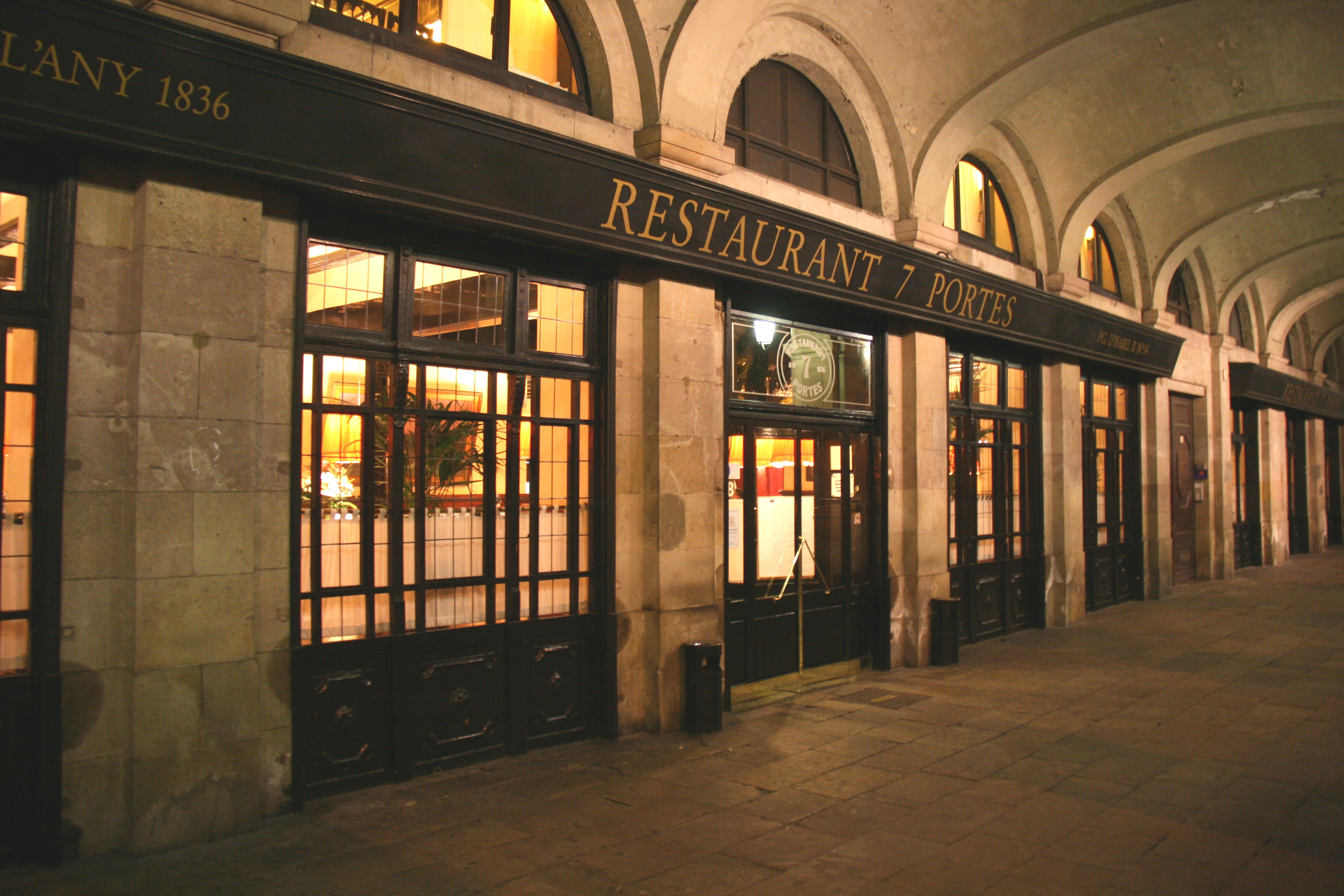 7 Portes